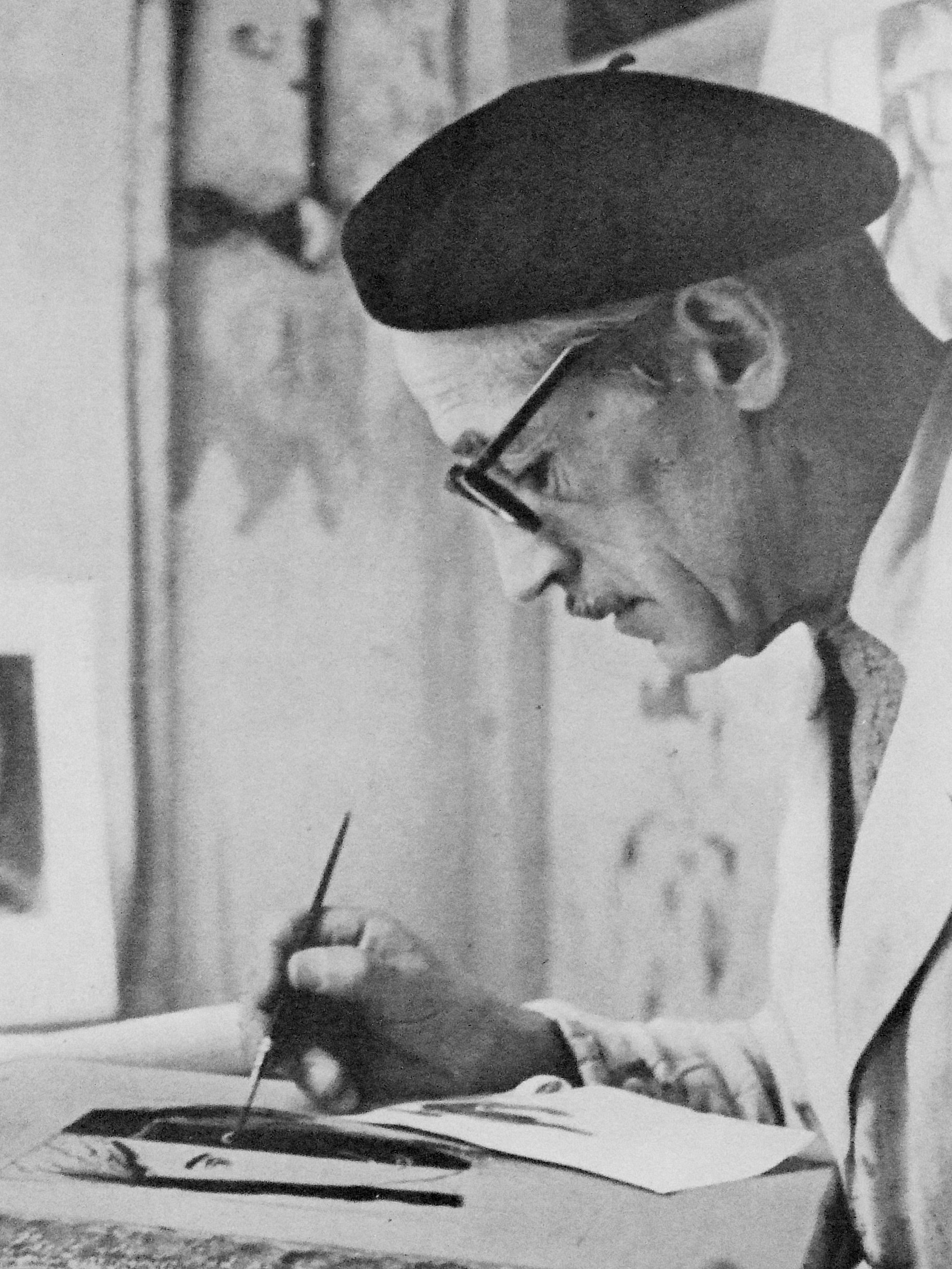 favre foto eigen werk